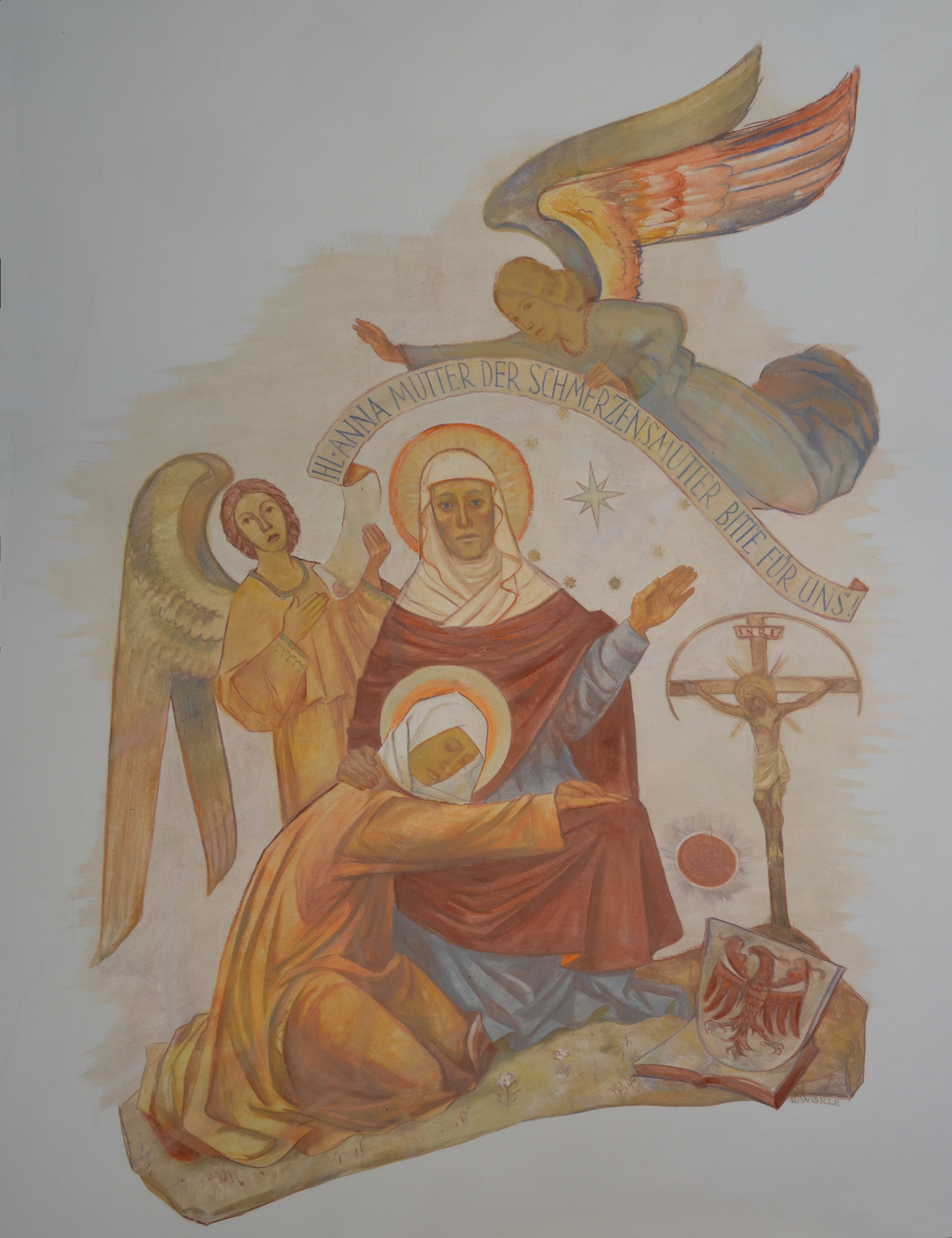 Kössen, Anna-Kapelle, Deckengemälde